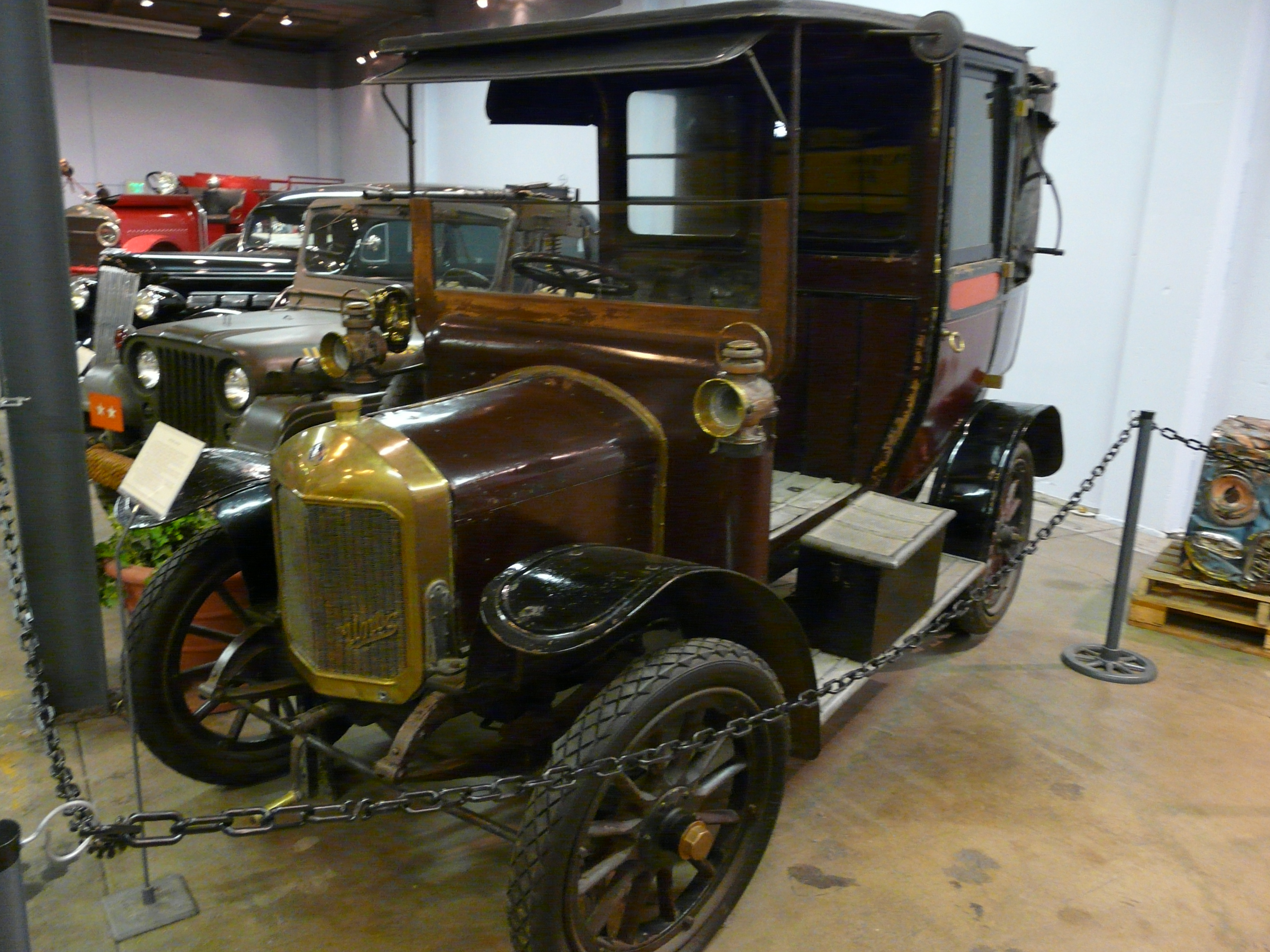 Denver, summer 2012